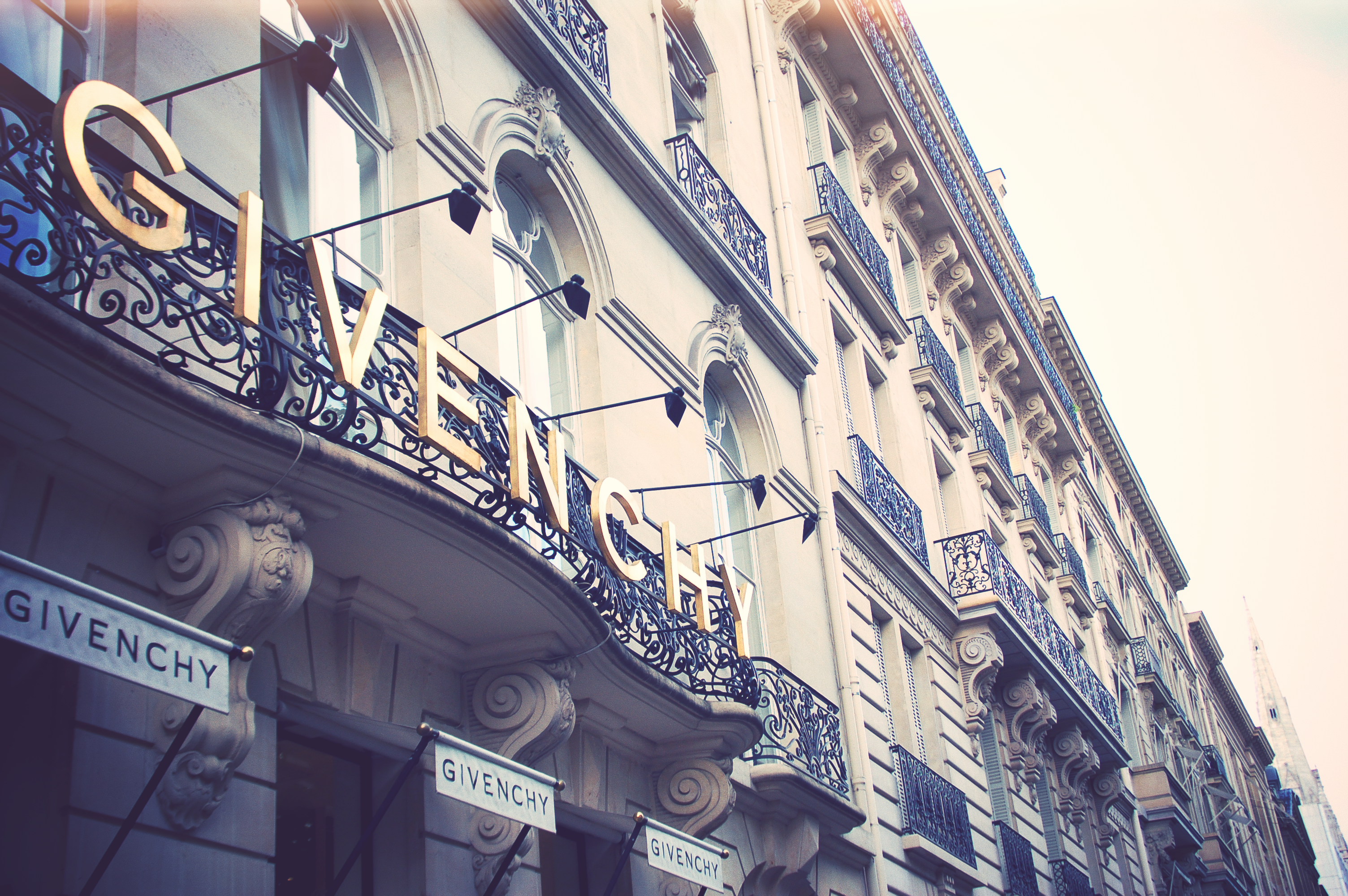 3 Av. George V.